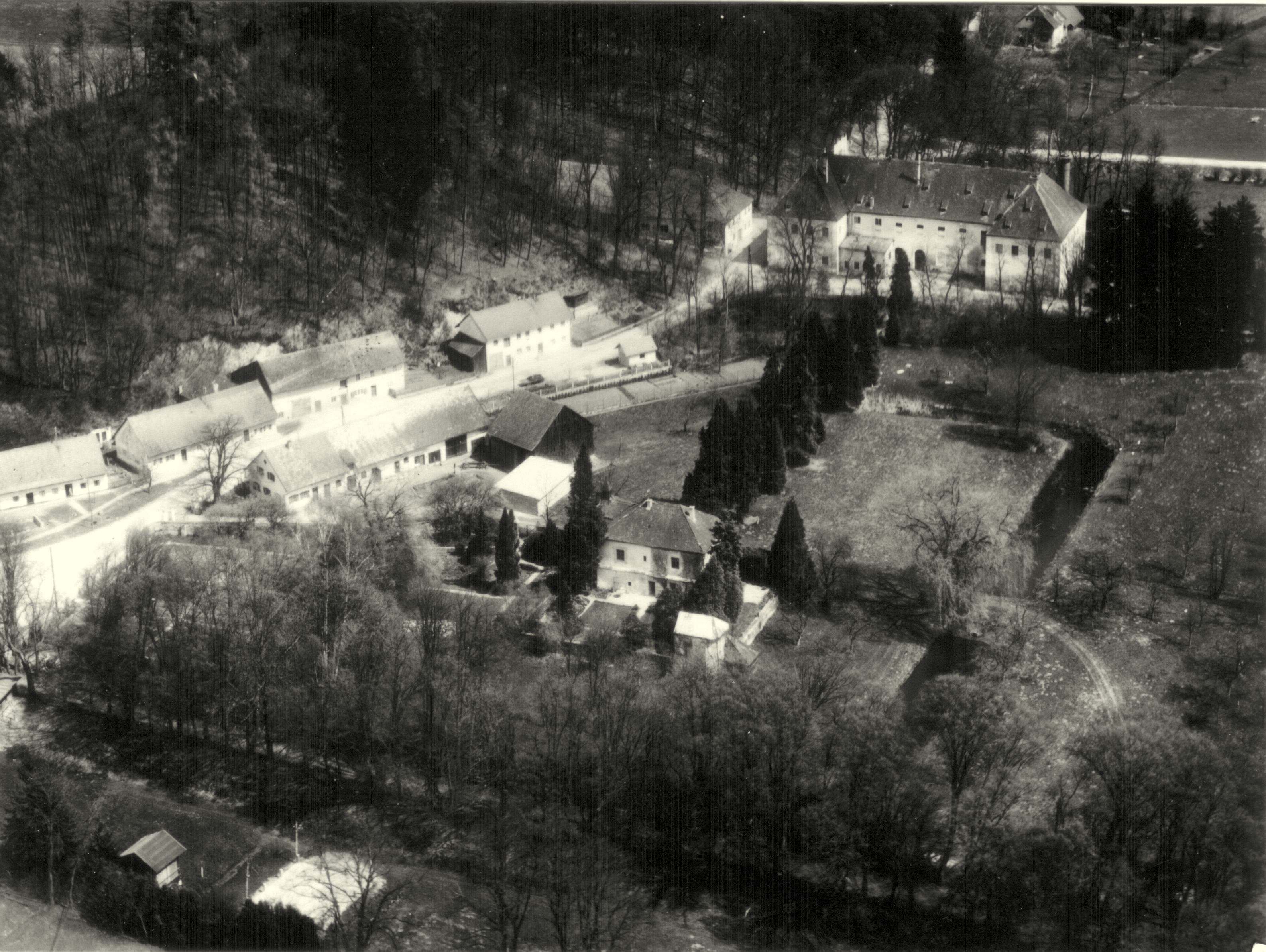 Blick auf den Schlossgarten mit dem Rest des Schlosses, im Hintergrund das Schlossbrauhaus